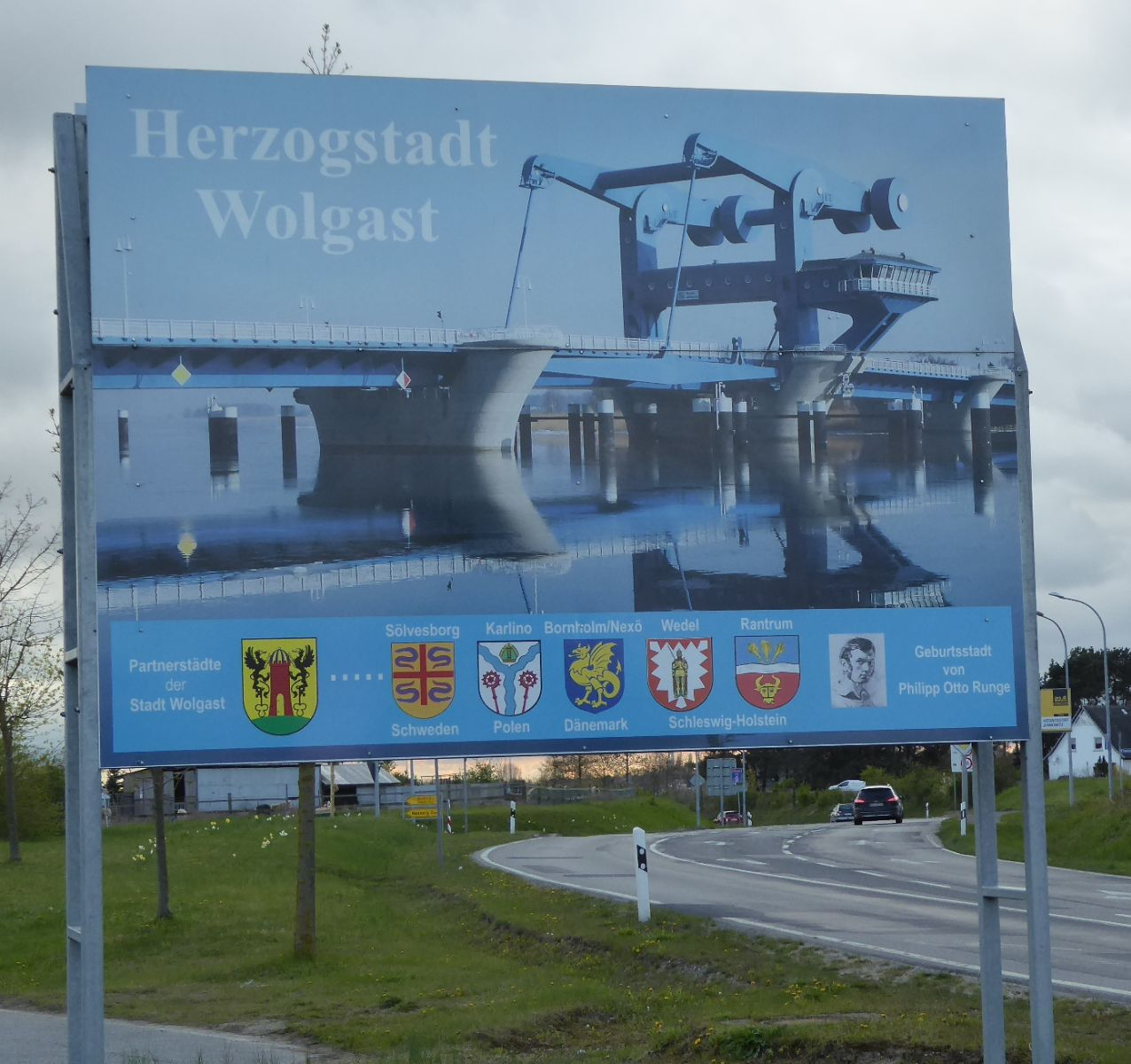 Wolgasts Partnerstädte